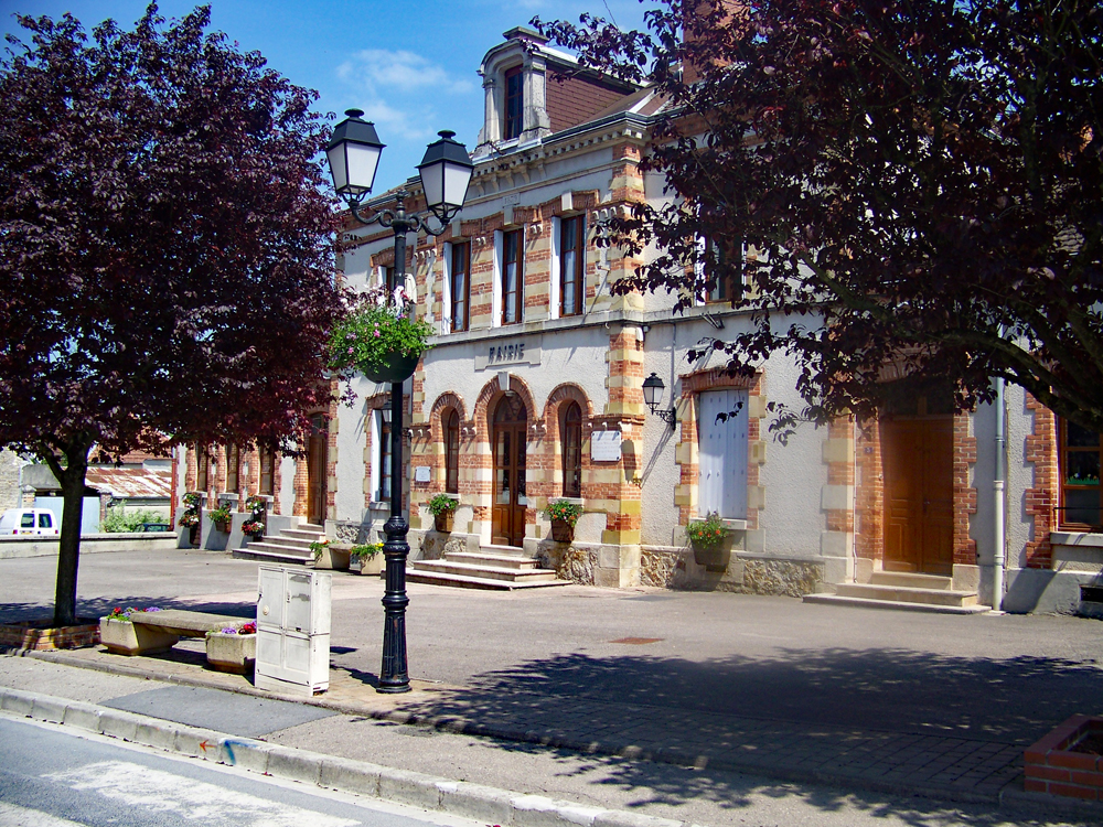 Mairie de Trépail